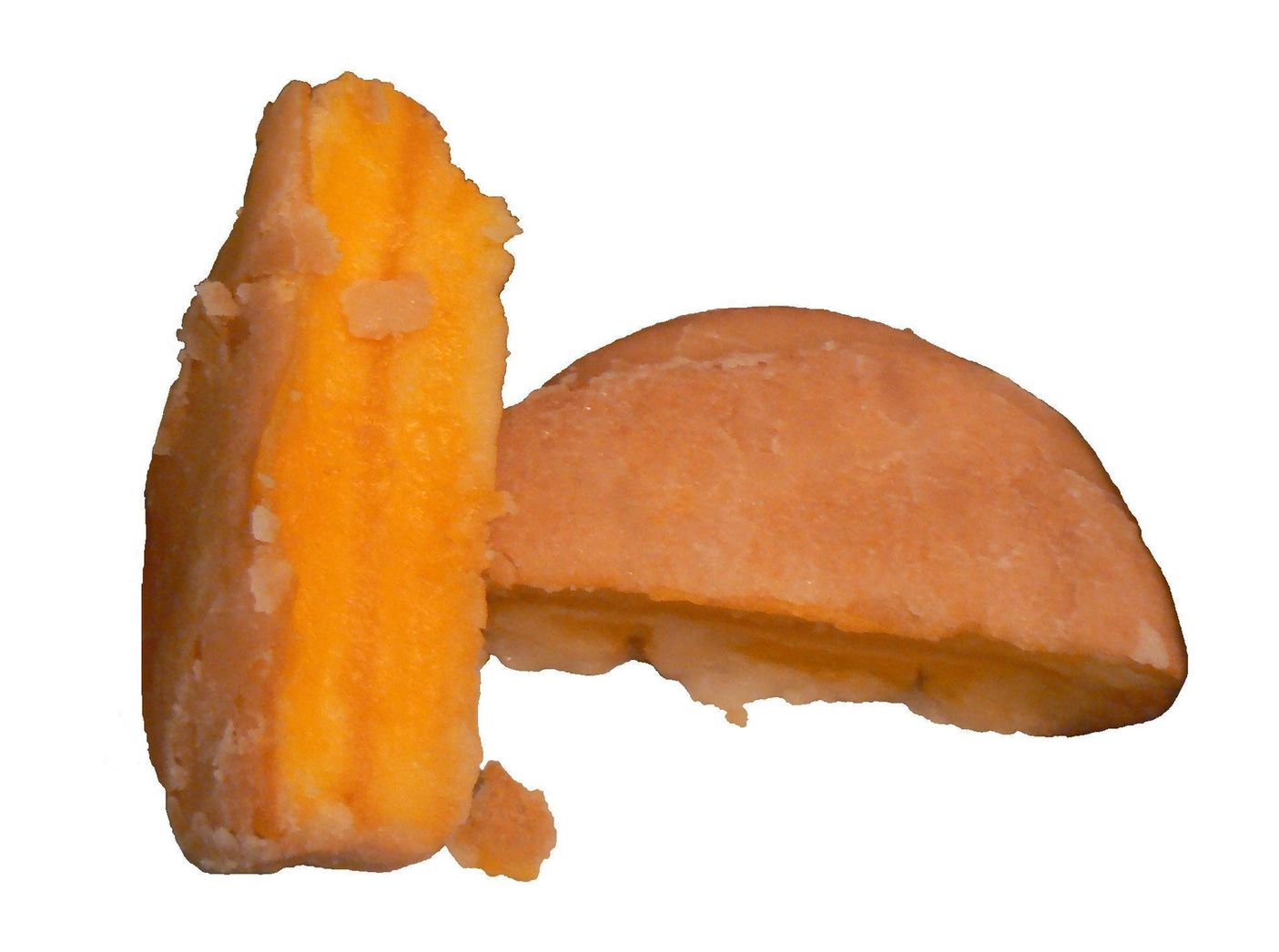 Dues mitgesllunes, pastisseria menorquina. Ferreries, any 2010.